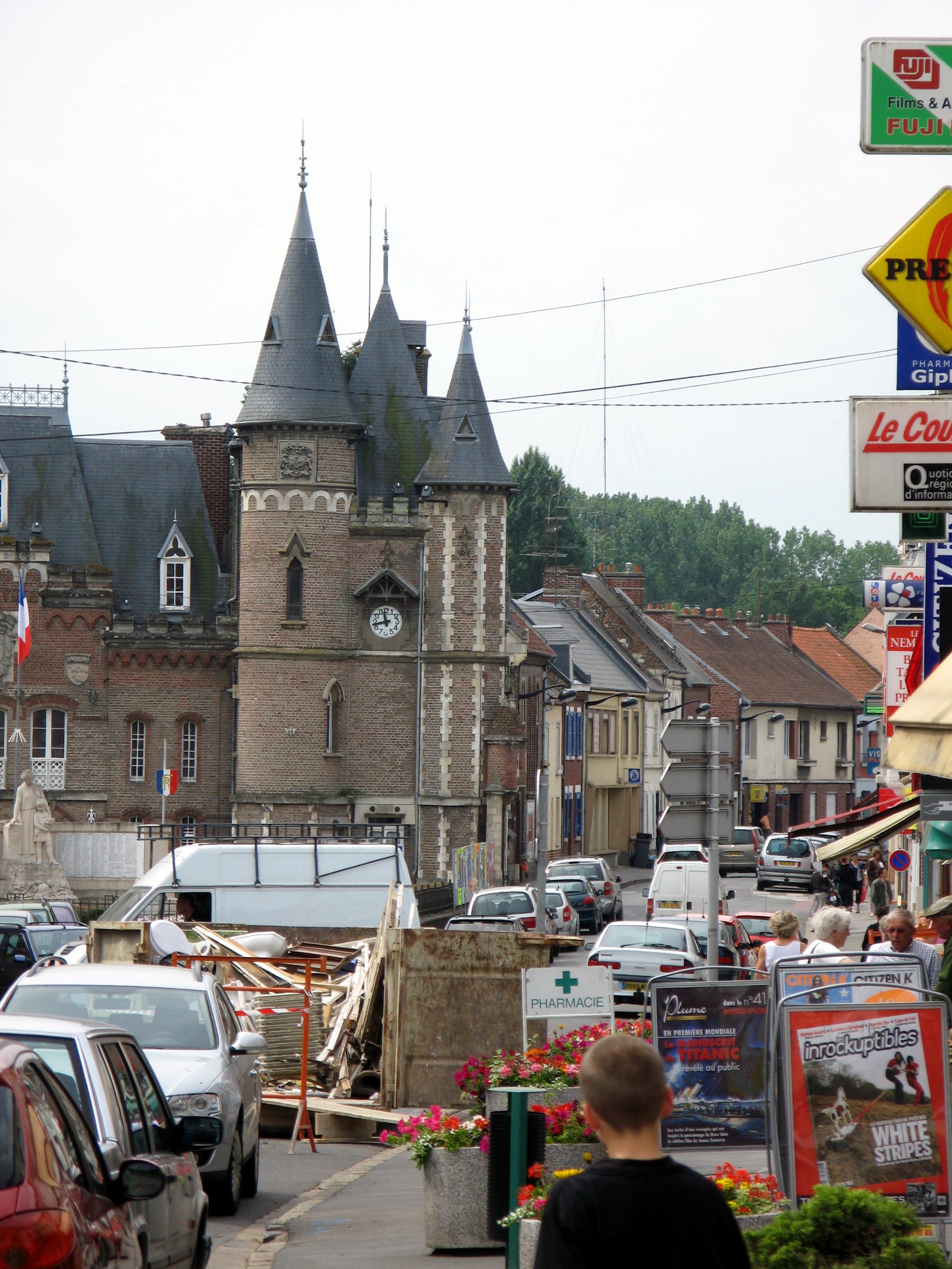 Corbie (Somme, France) - Rue principale avec mairie et monument aux morts. Rue Marcellin Truquin (vue vers le Sud). Le Monument aux Morts est ici à gauche, devant la Mairie avec ses tourelles.